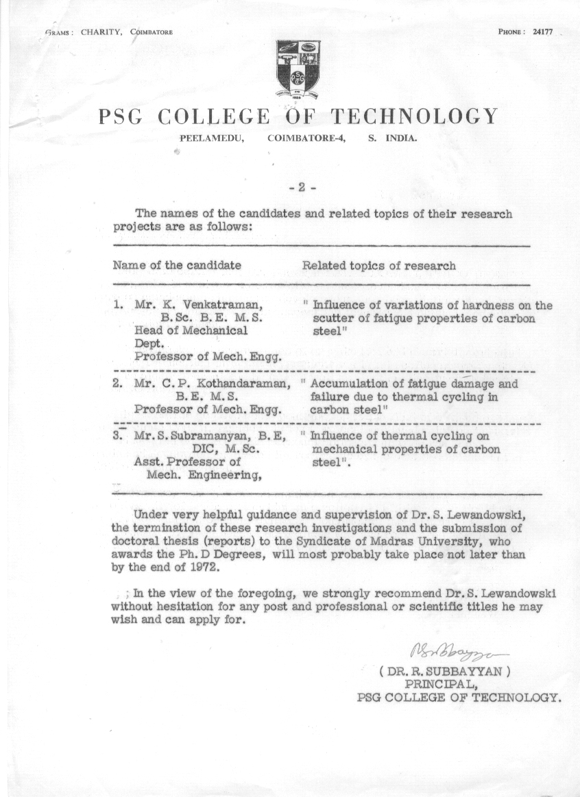 Zaświadczenie o pracy w PSG College of Technology